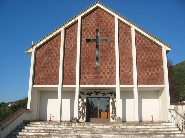 Fredskapellet i Narvik i Narvik